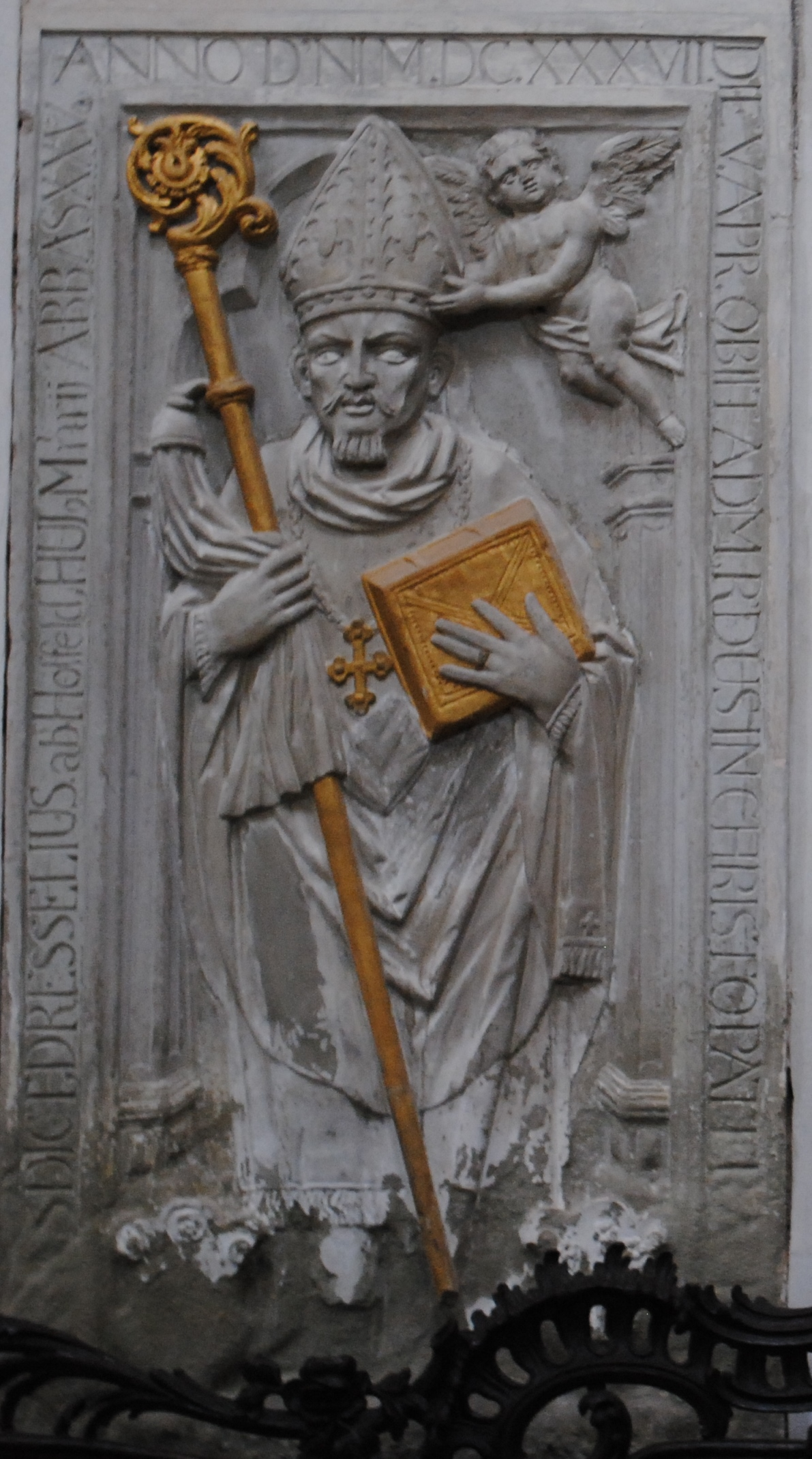 Epitaph des Johann Dressel, Abt von Kloster Ebrach, Amtszeit 1618-1637